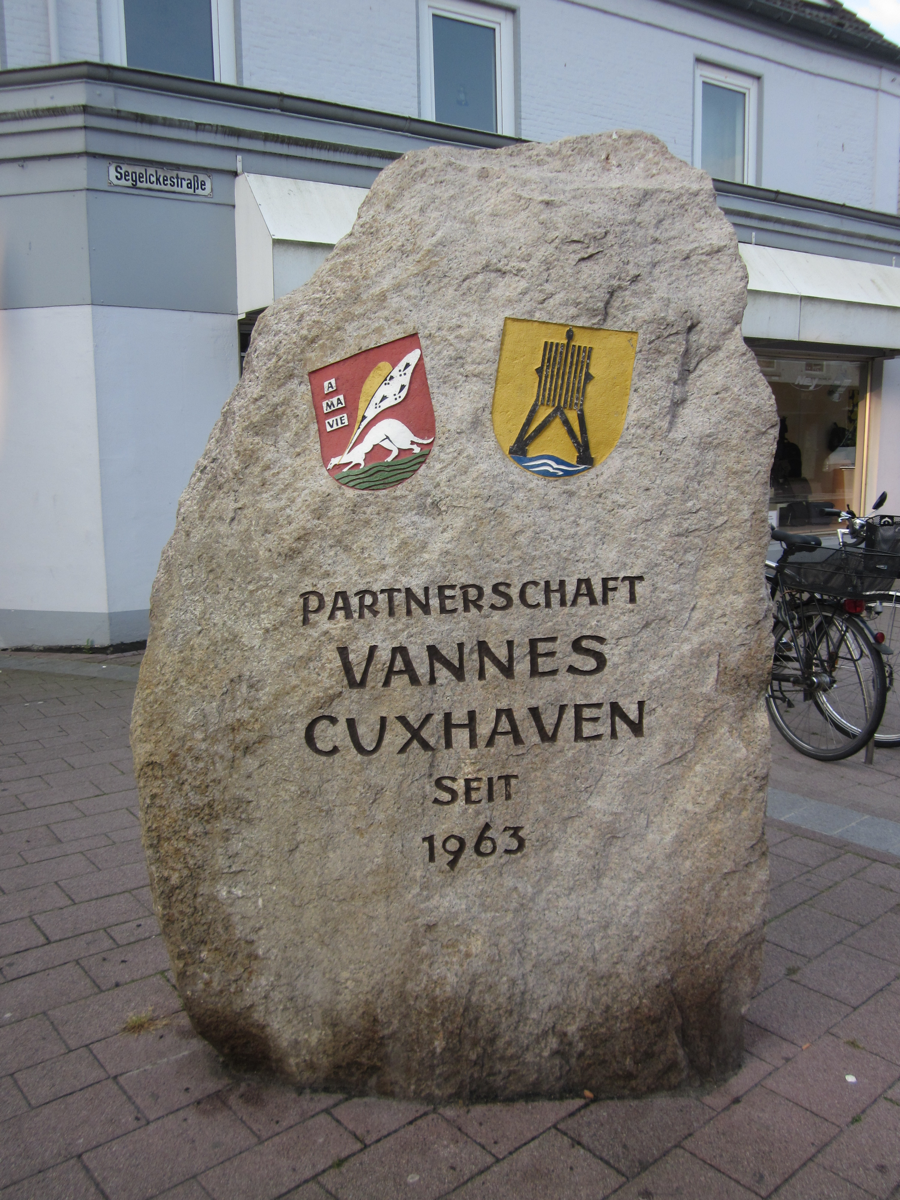 Findling in der Cuxhavener Nordersteinstraße, der auf die Partnerschaft mit Vannes hinweist.